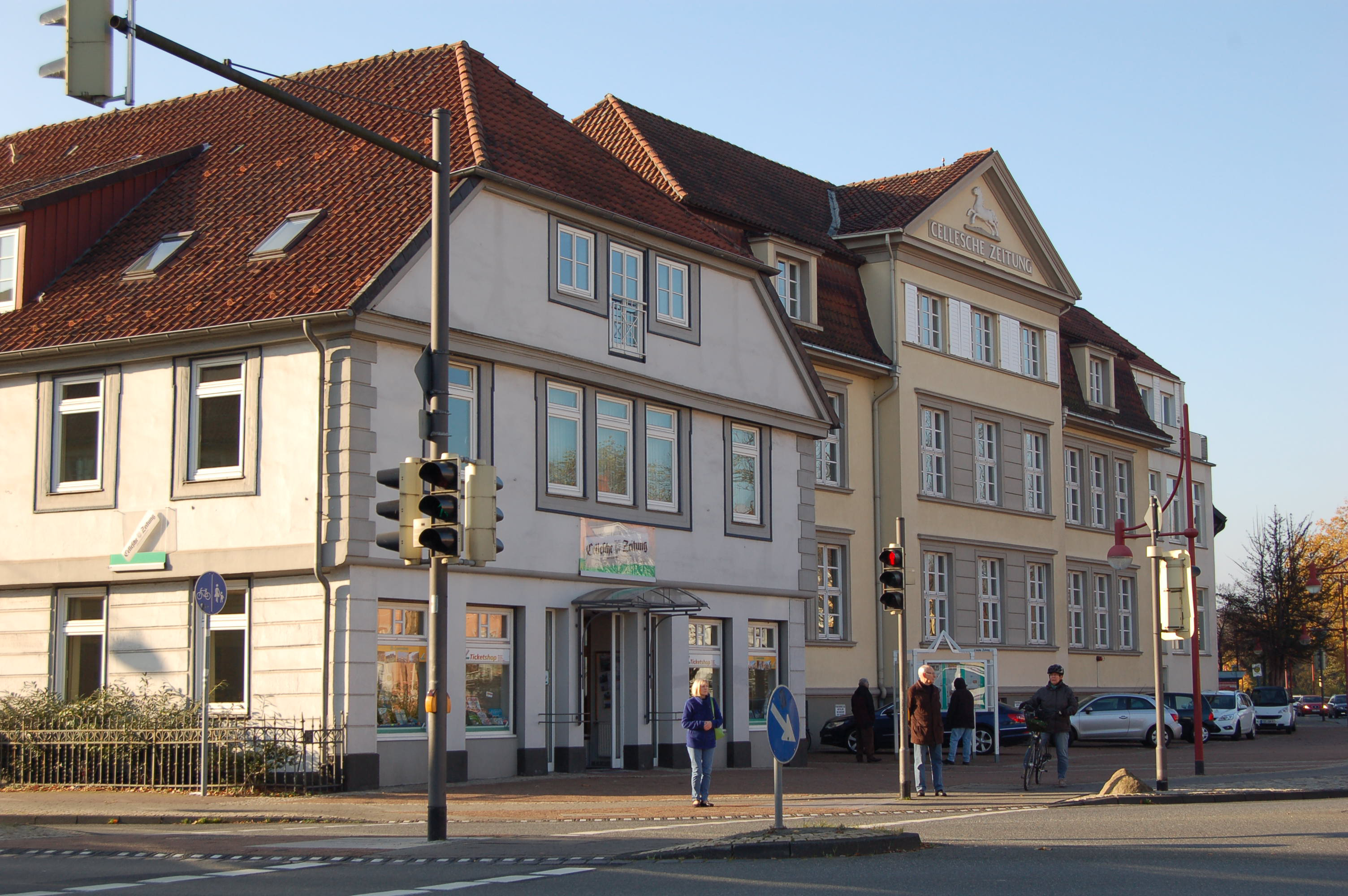 Verlagsgebäude der Celleschen Zeitung